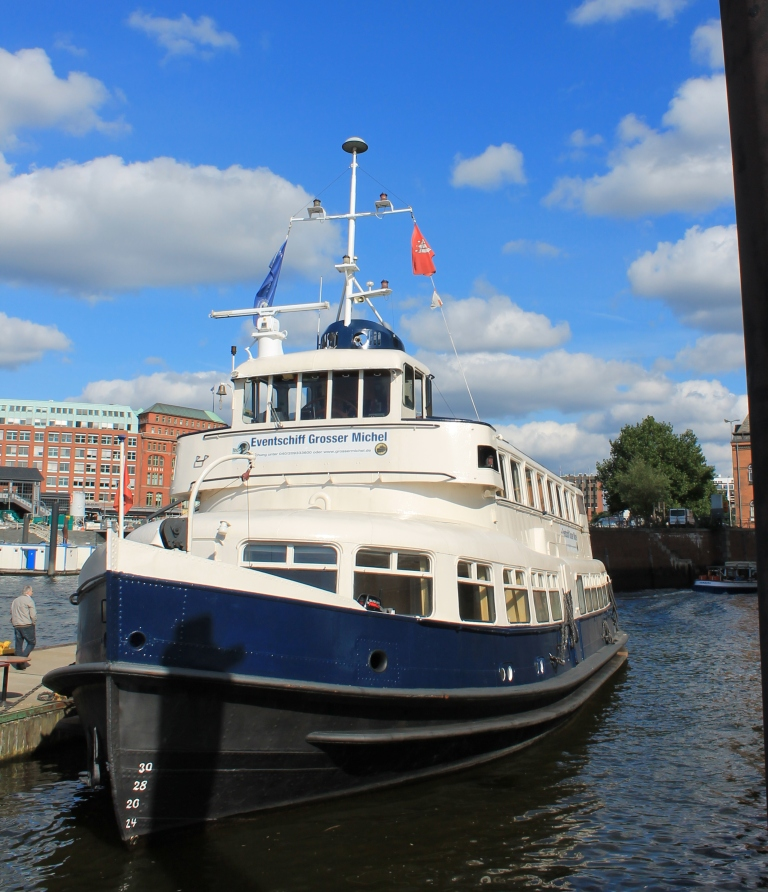 Liegeplatz